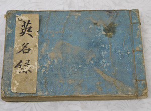 久保源次郎利雄：英名録